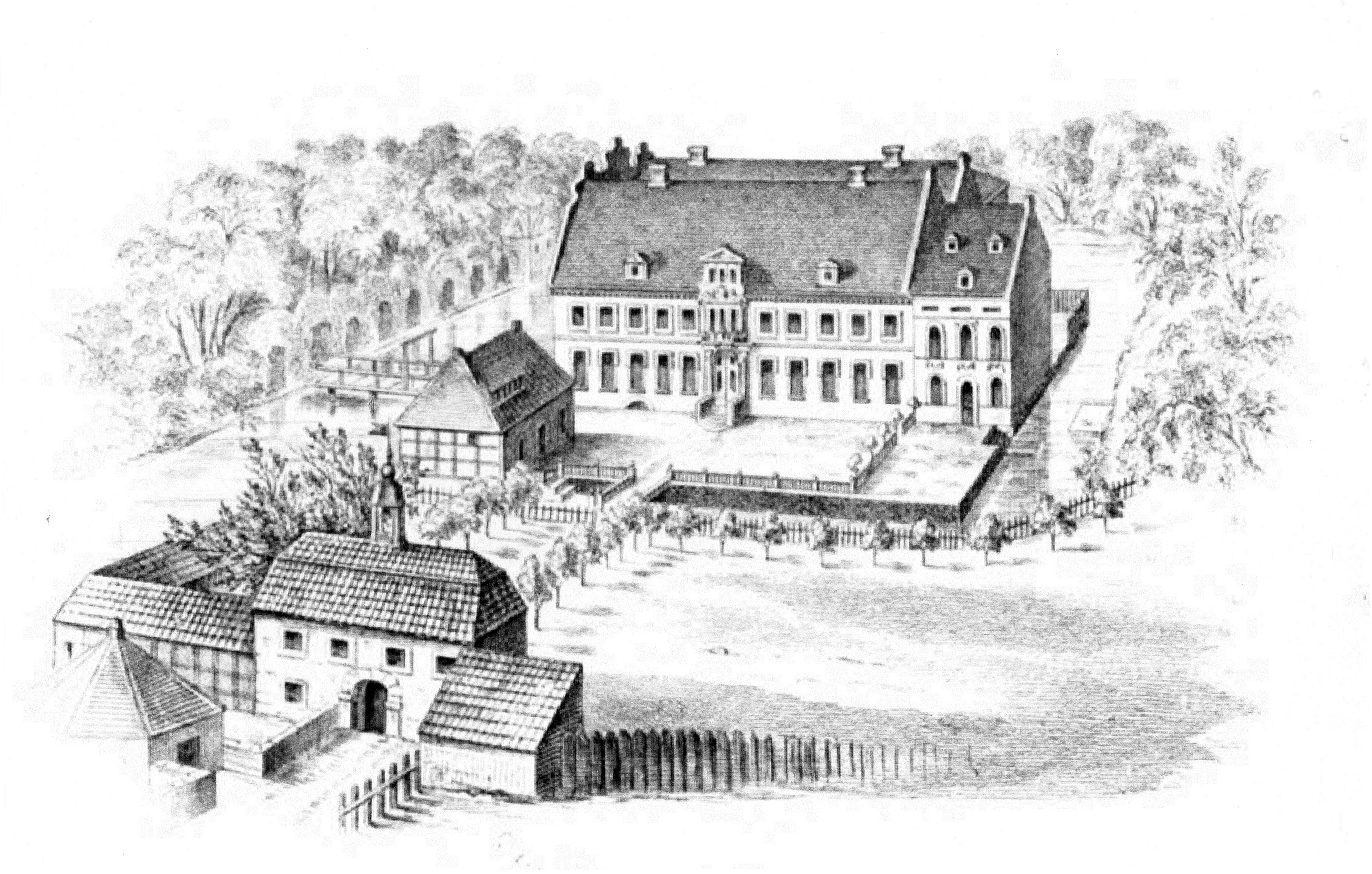 Gut Jersbek um 1747, Zeichnung von Köhler und Roisternitz 1862